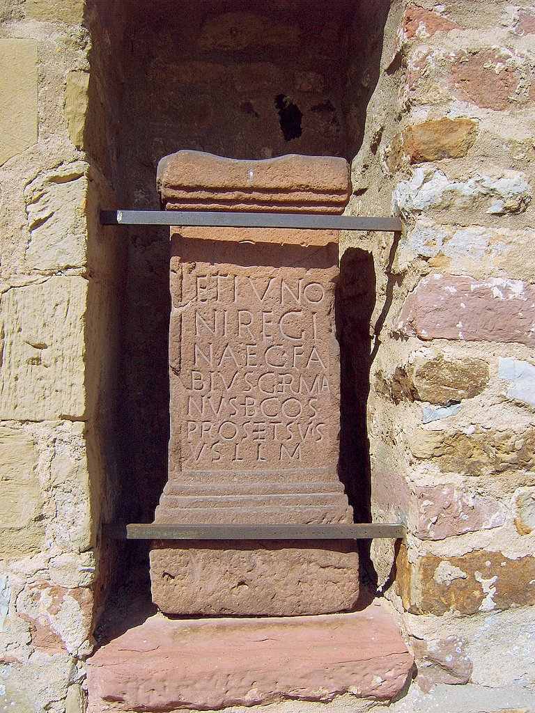 Römischer Weihealter (CIL 13, 06485) des Beneficiarius consularis Caius Fabius Germanus aus dem 2. oder 3. Jahrhundert in der Mauer der Michaelskapelle (Gundelsheim)